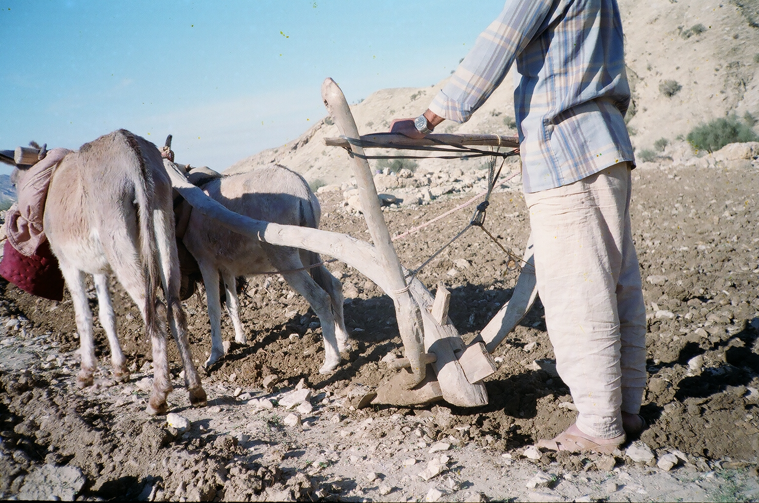 شخم زدن زمین با خیش و الاغ در منطقه کفکشکنان.